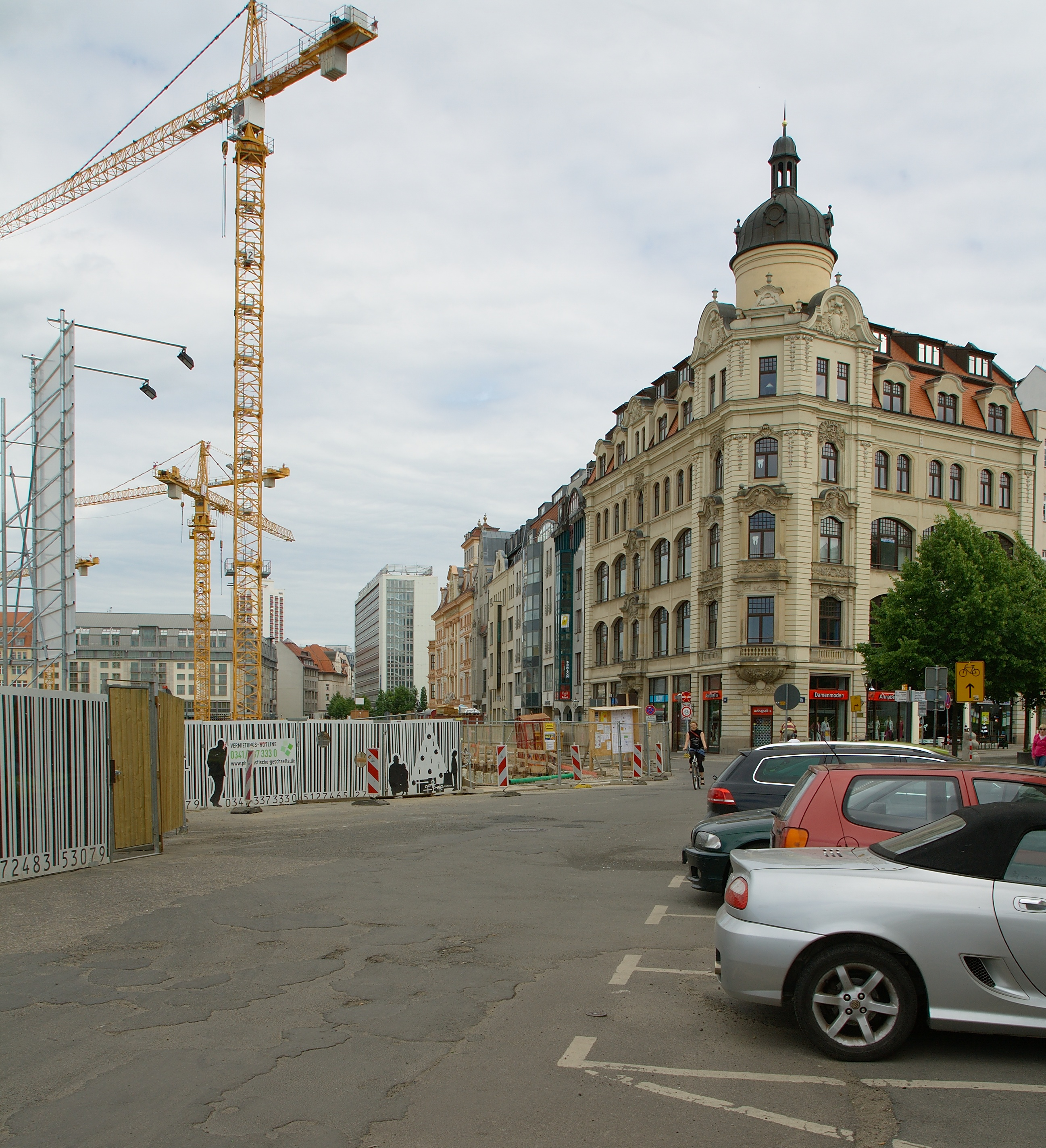 Baustelle "Höfe am Brühl", Leipzig 29.05.2011